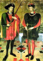 Taula central del retaule dedicat a aquests sants